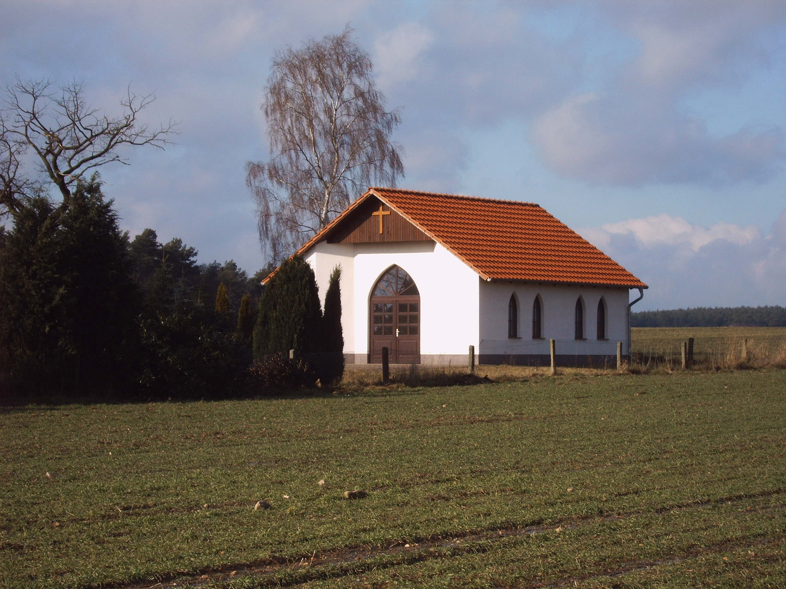 Friedhofskapelle in Breitenfeld, Sachsen-Anhalt, Deutschland Bild aufgenommen am 17.2.2006 Urheber: Olaf Meister